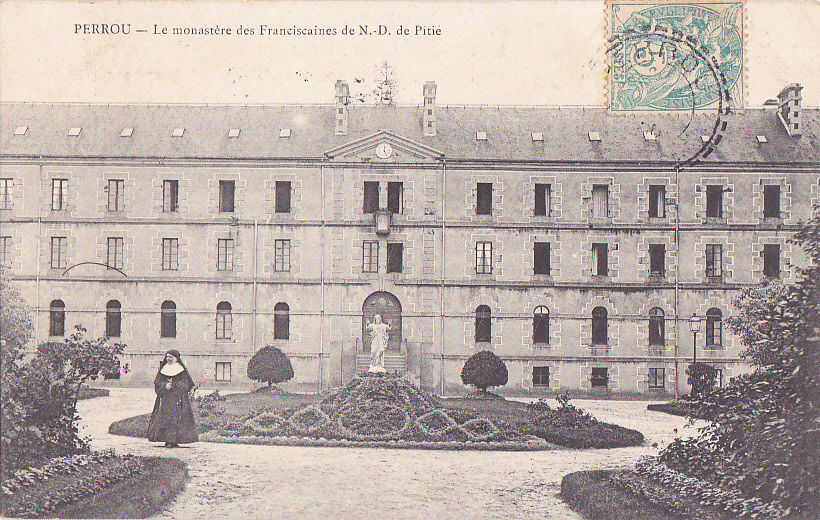 Maison-mère des franciscaines de Notre-Dame-de-Pitié de Perrou au début du XXe siècle.